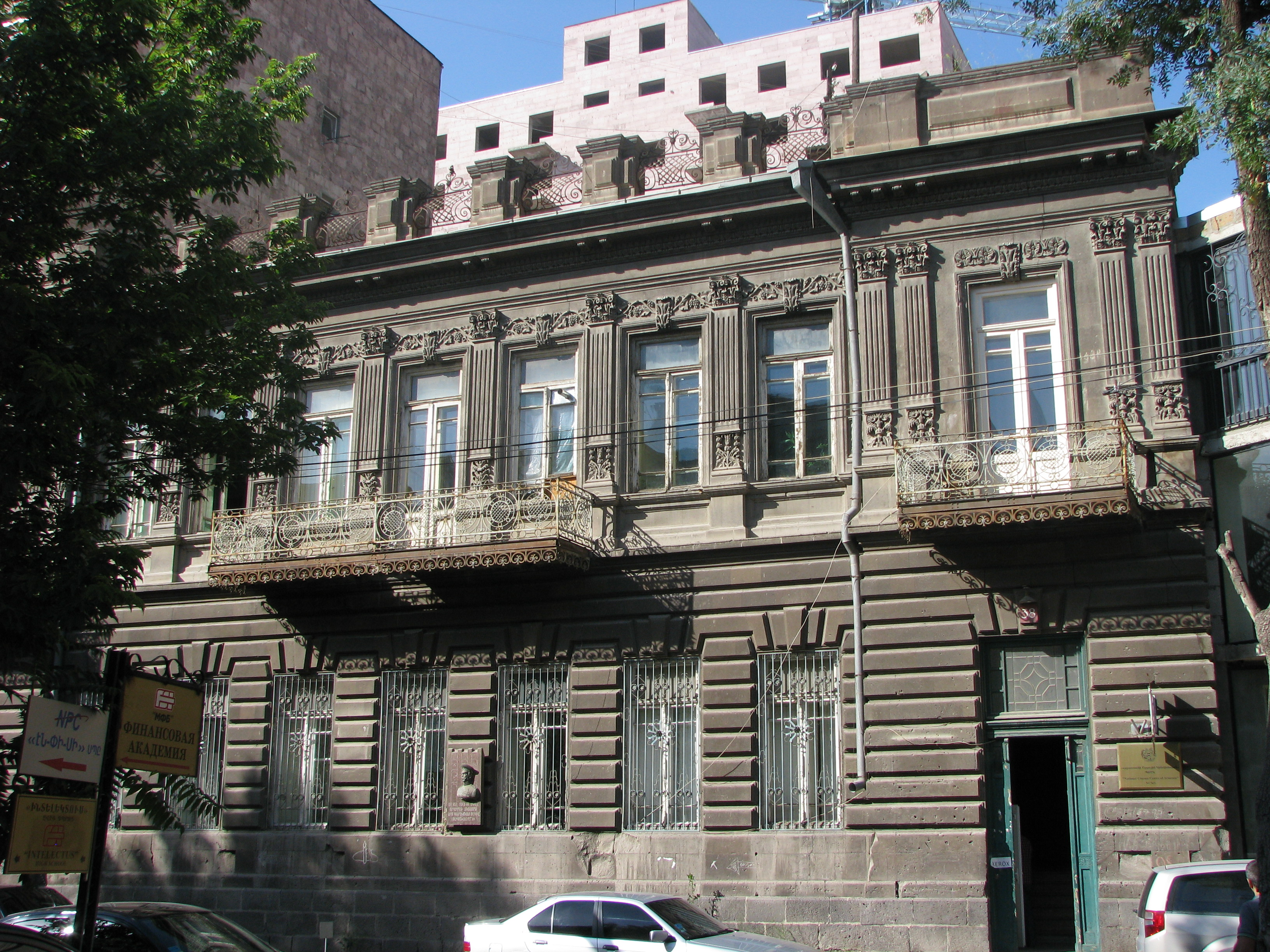 Առաքել Աֆրիկյանի տունը 6/195